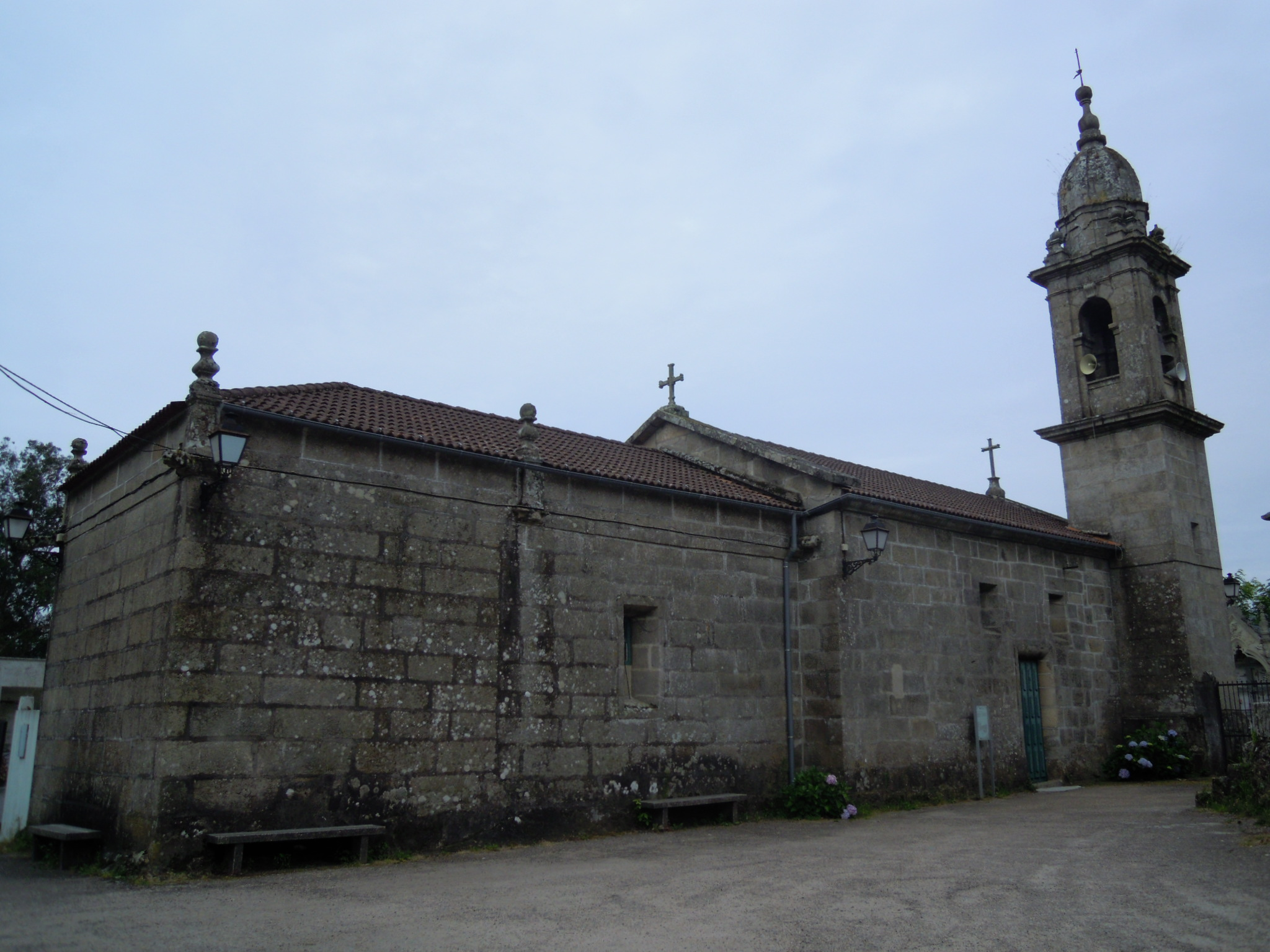 Igrexa parroquial de Santa María de Alba (Pontevedra)